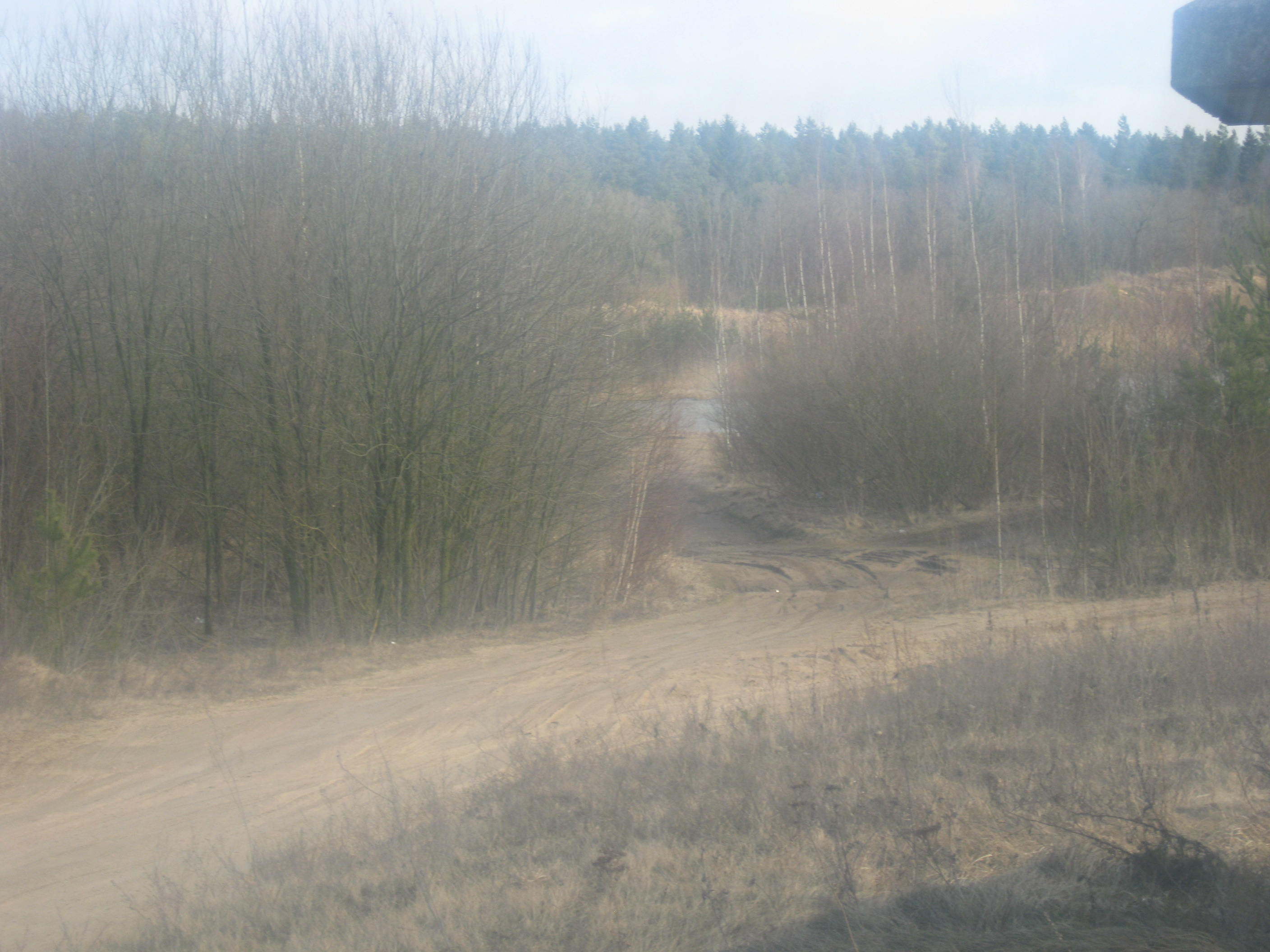 Markutiškių smėlio karjeras